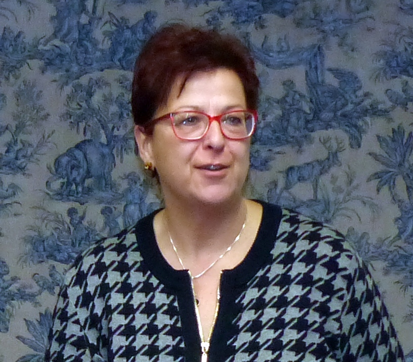 Verena Hergenröder — Bürgermeisterin von Ebersbach-Neugersdorf, Landkreis Görlitz